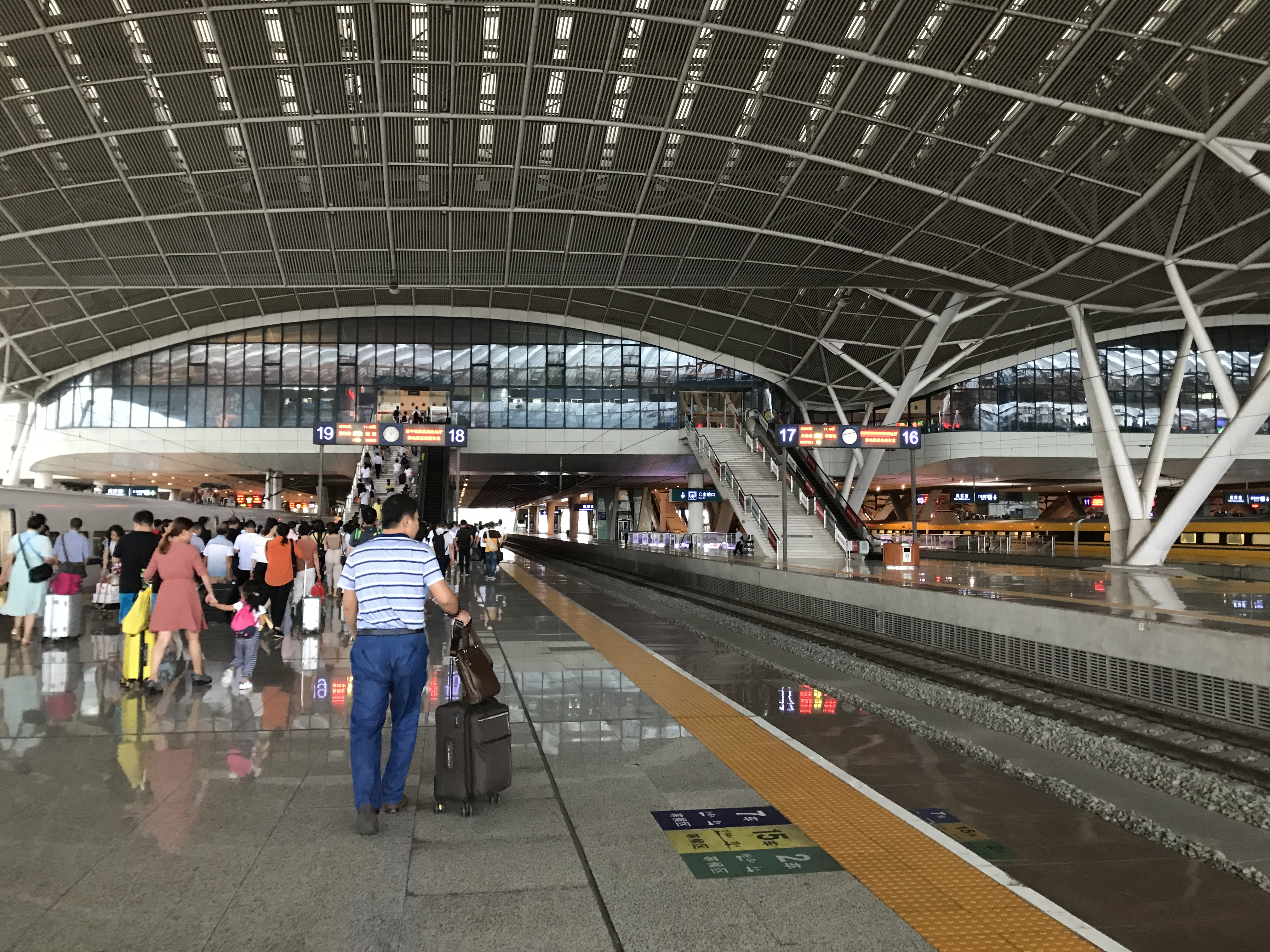 武漢駅のホーム